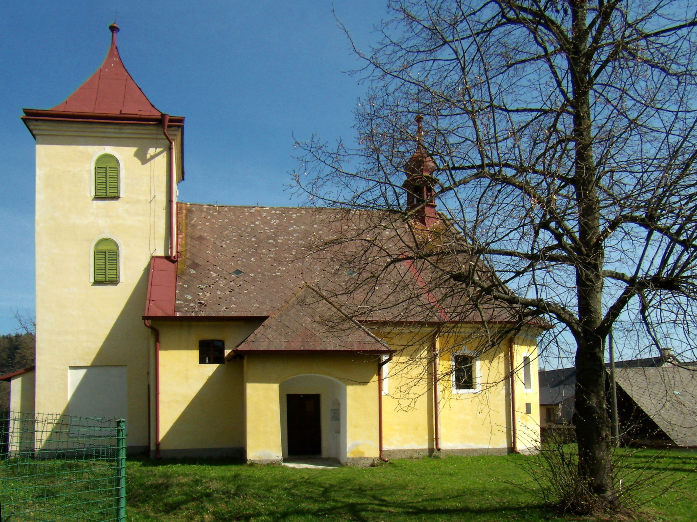 Habartice - kostel sv. Petra a Pavla